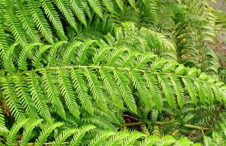 Parte de una fronda de ampe o palmilla {Lophosoria quadripinnata en Valdivia, Chile